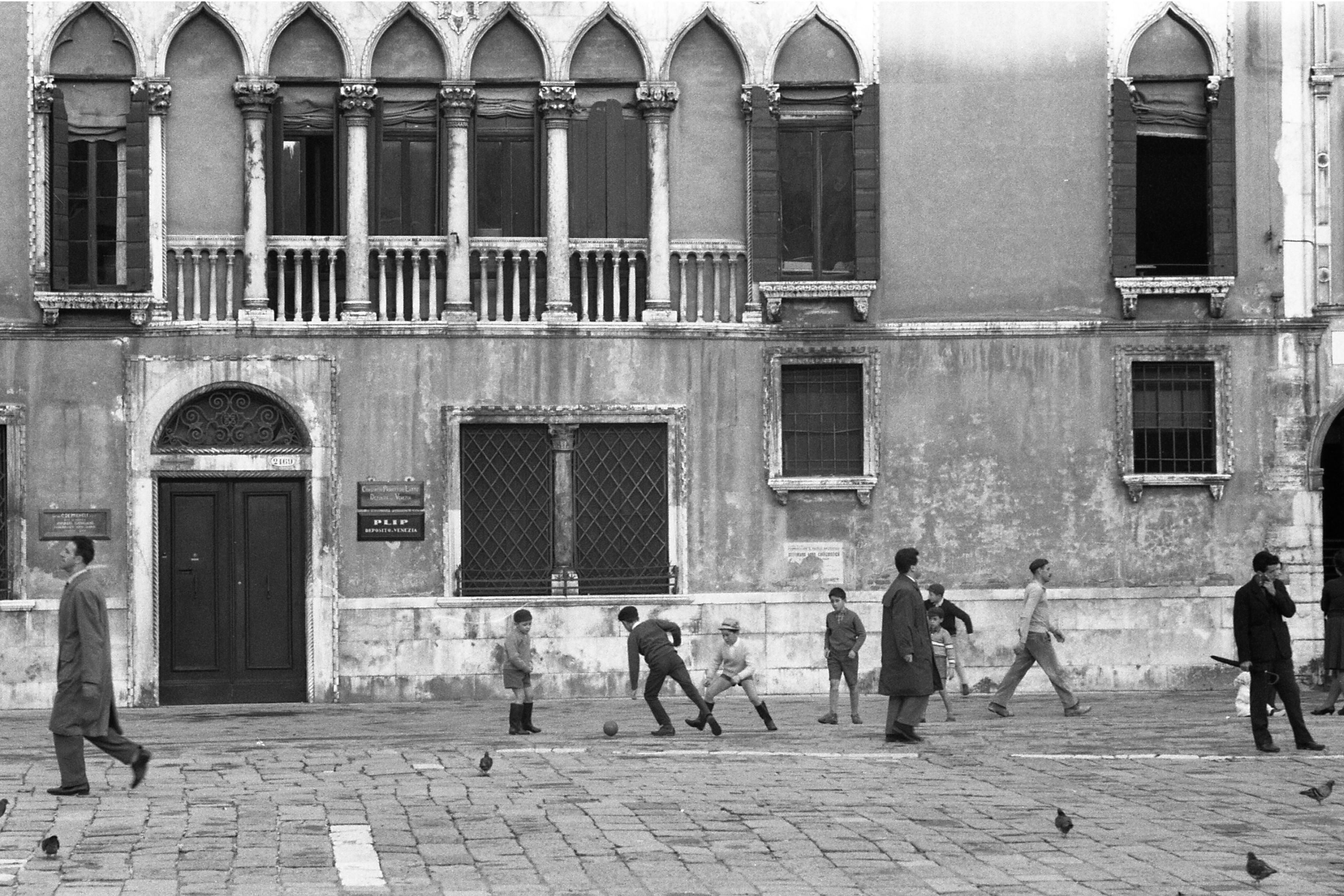 Serie fotografica : Venezia, 1960 / Paolo Monti. - Strisce: 3, Fotogrammi complessivi: 18 : Negativo b/n, gelatina bromuro d'argento/ pellicola ; 35 mm. - ((I fotogrammi hanno una doppia numerazione. . - Sul portanegativi: Leica FP3. - Serie Verde. - I bambini sono un soggetto ricorrente nelle fotografie di Monti. Caso vuole che in questa serie siano fotografati a Campo S. Polo, una zona di Venezia che in passato si creò un'identità ludica, essendo teatro di feste pubbliche, giochi, come ad esempio il gioco della palla e della caccia al toro. - Fonte: Agenda di Paolo Monti: Foto Leica 1 / 1-51 verde, 1-110 nera (1958-1963), presso Archivio Paolo Monti